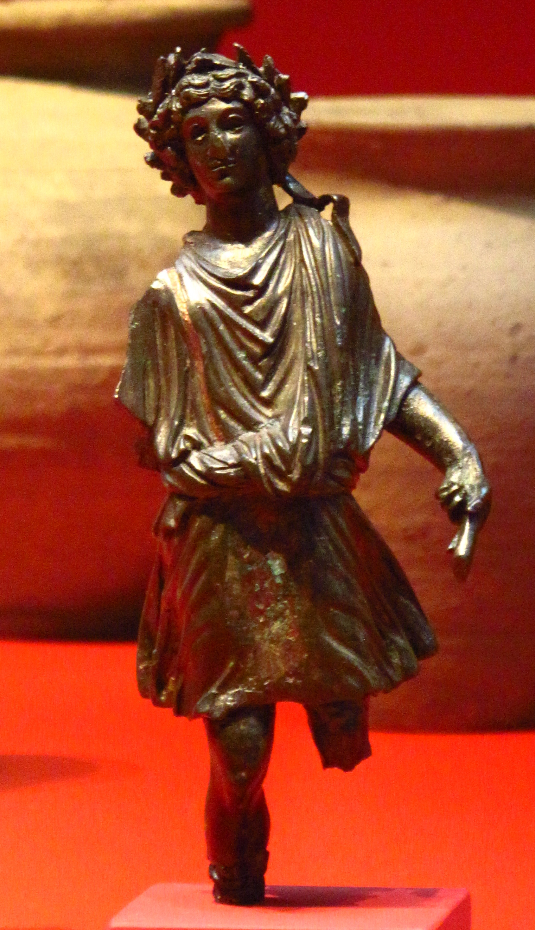 Statuette de Lares Augusti de l'époque gallo-romaine, en bronze (Bretagne est Univers, Musée de Bretagne, Rennes, France)